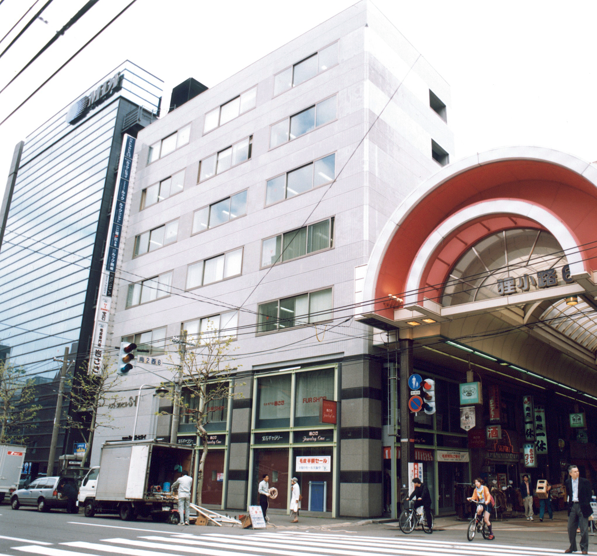 ルックヒライ本社ビル